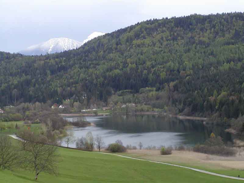 Aufnahme wurde im Frühling 2004 gemacht. Fotograph: Martin Kirchbacher